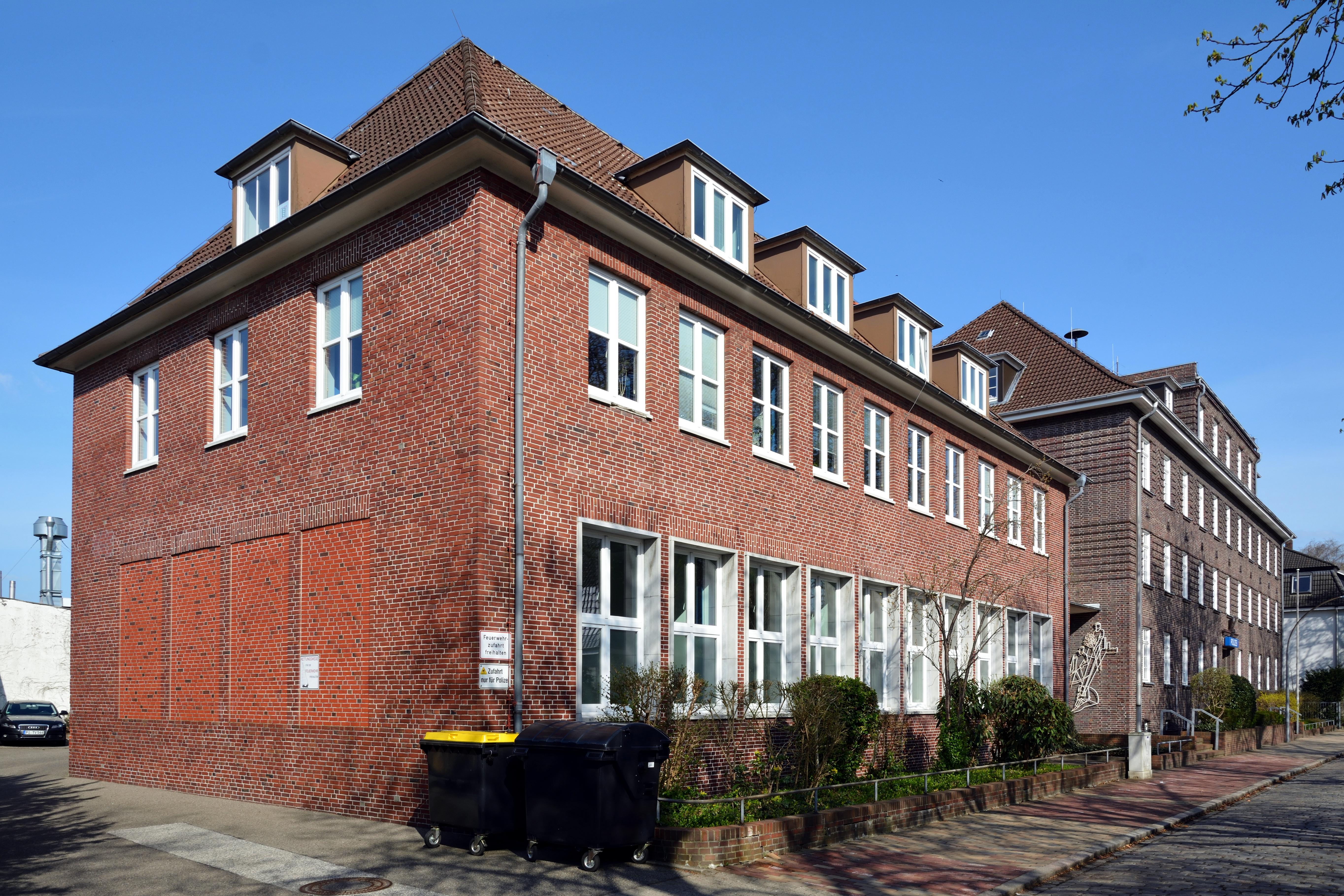 Das ehemalige Arbeitsgericht in Elmshorn, Moltkestrasse neben der Polizeiwache.